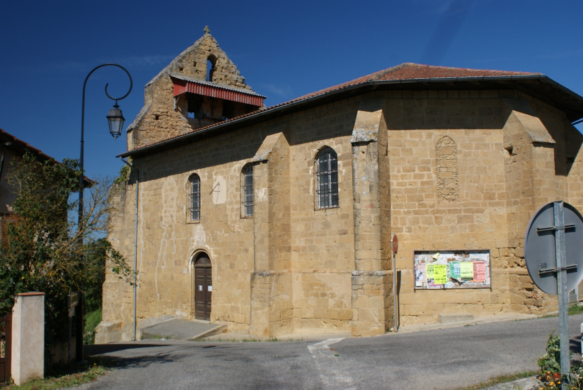 De kerk in het dorpje Mondilhan in de Haute-Garonne Frankrijk.